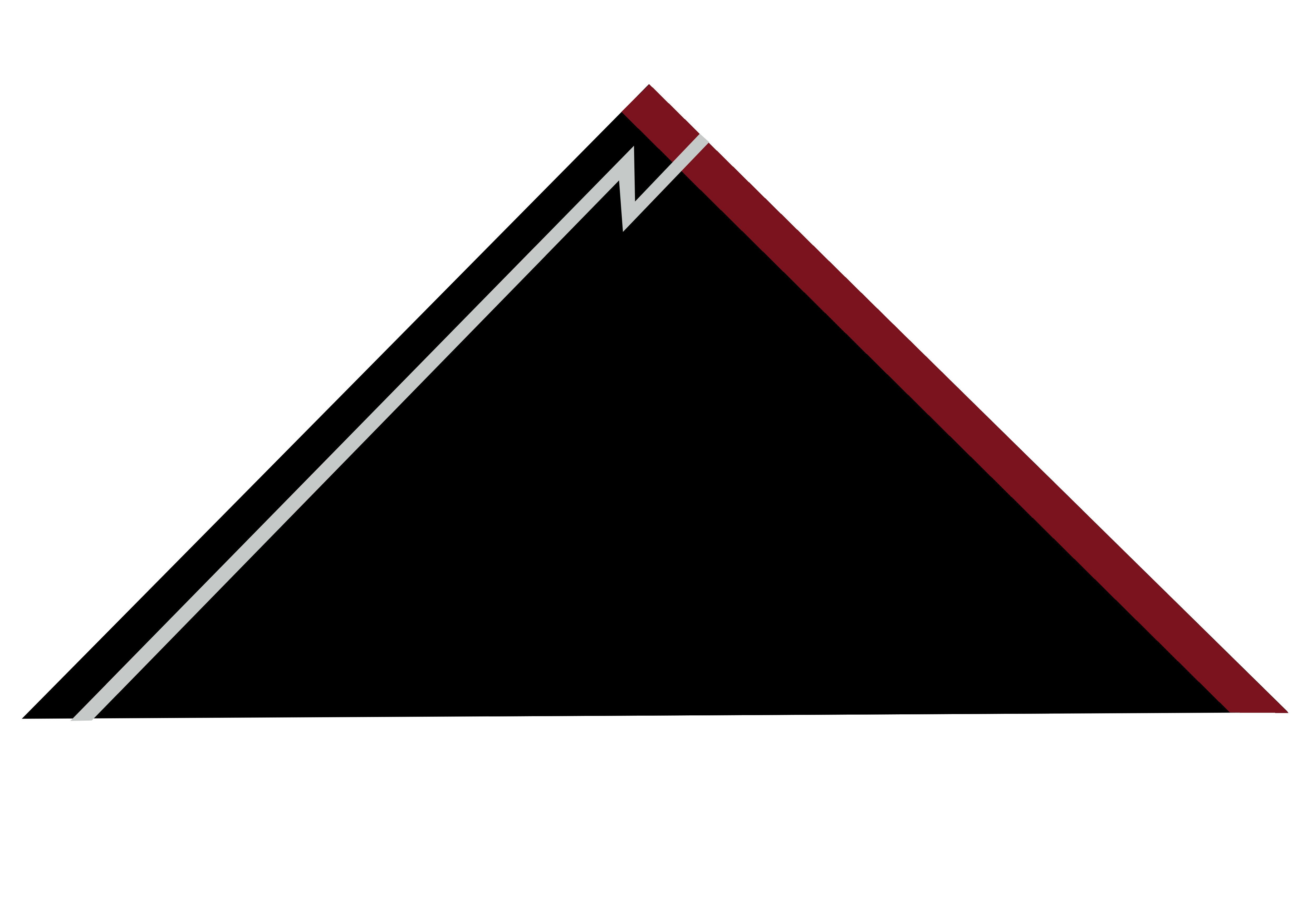 Hustka